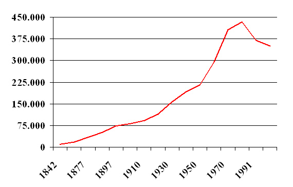 Bilboko biztanleriaren bilakaera.